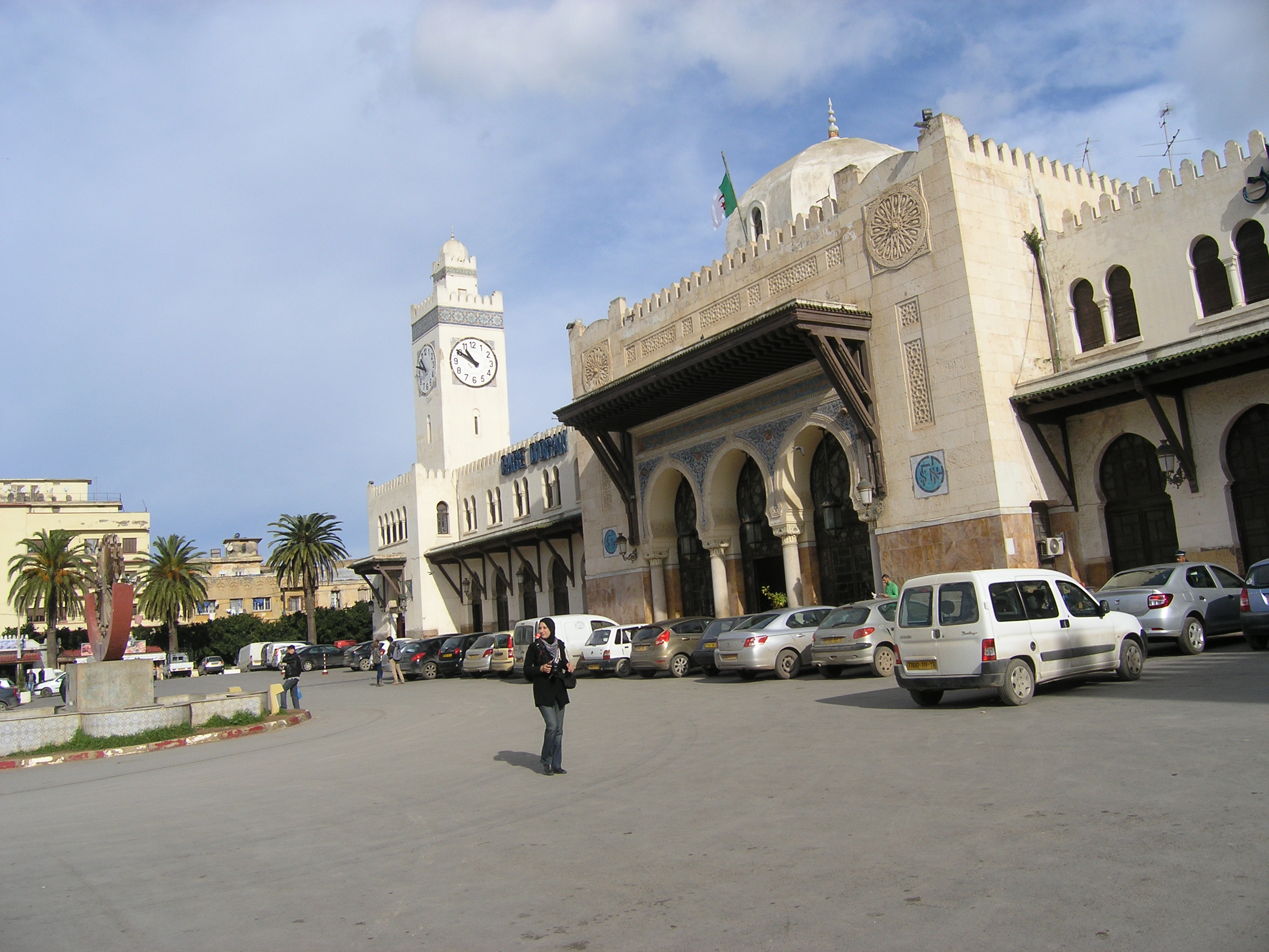 Institut français en partenariat avec ISOClub et l'association la grande maison de Tlemcen organisent Les journées de la Photo 2014 du 11 au samedi 15 février 2014.